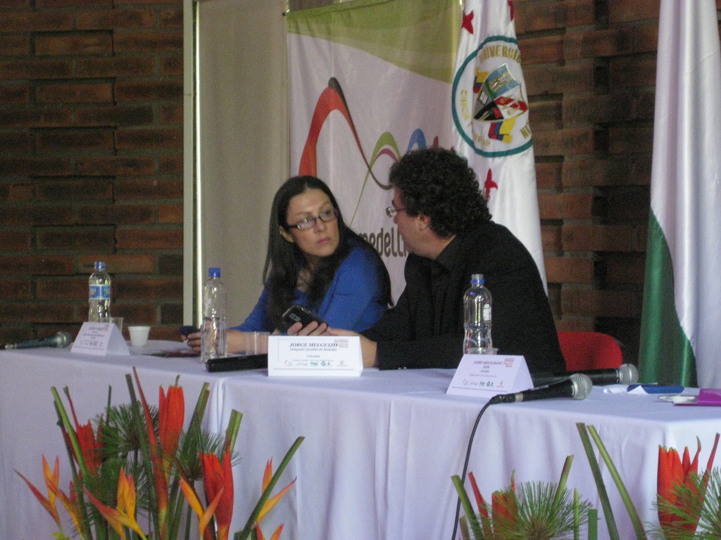 Seminario Internacional de Periodismo Deportivo en el marco de los IX Juegos Suramericanos Medellín 2010. A la izq, Alicia Eugenia Vargas Restrepo Directora General de los Juegos, abogada y tecnóloga deportiva.